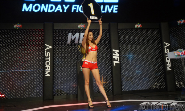 에이스톰 '최강의군단' 기자간담회